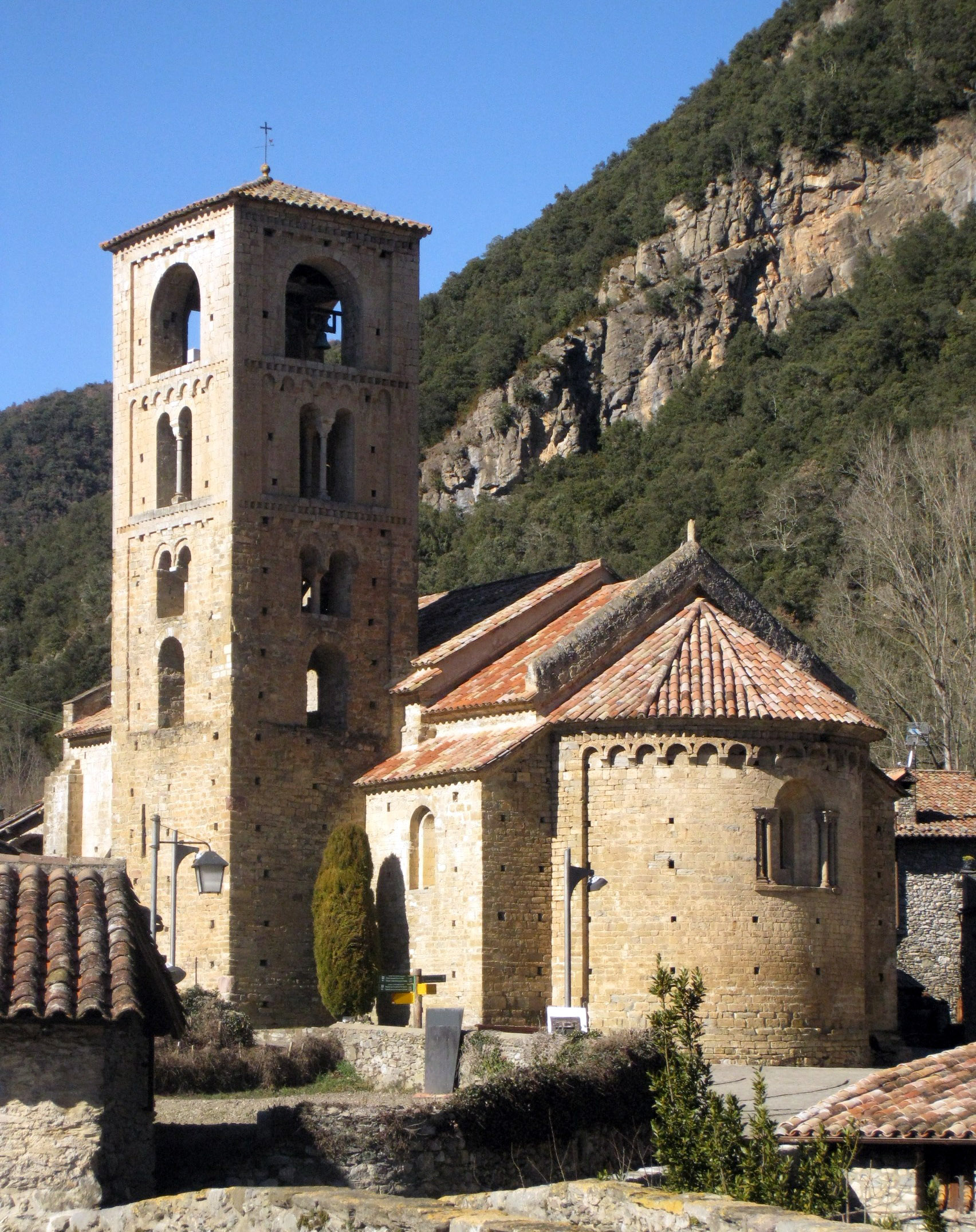 Església de Sant Cristòfol de Beget (Camprodon)